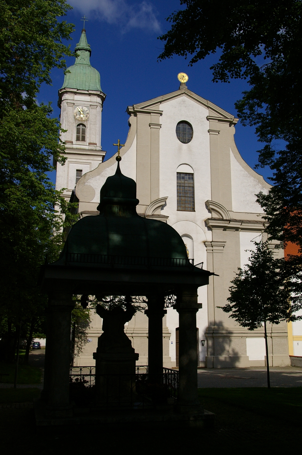 Sankt Peter und Paul in Freising (im Vordergrund die Silhouette des Kriegerdenkmals).